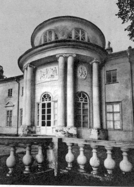 Елизаветино (усадьба Покровское-Стрешнево). "Ванный домик" (не сохранился)